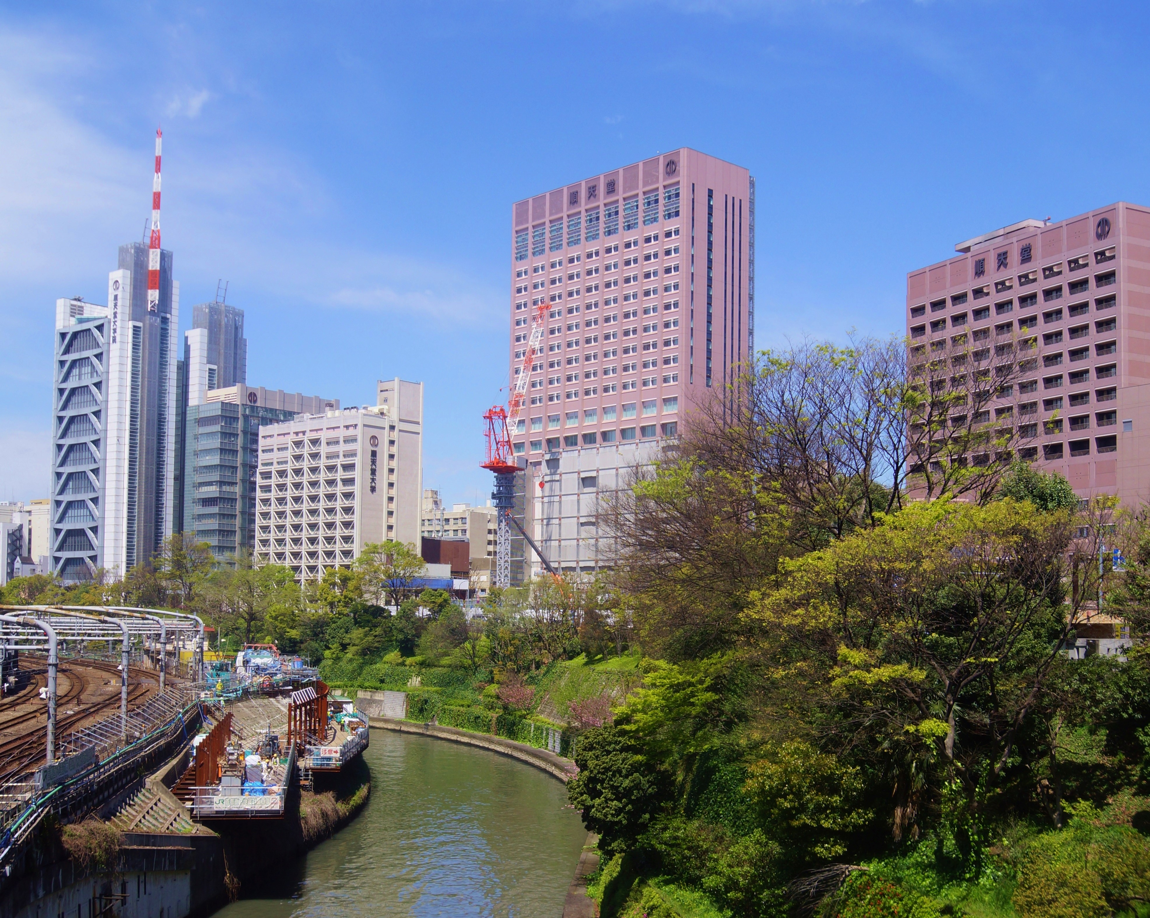 御茶ノ水橋から見た本郷キャンパス・ホスピタル群